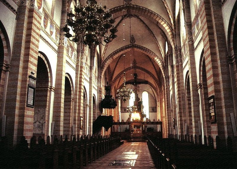 Sorø Klosterkirke